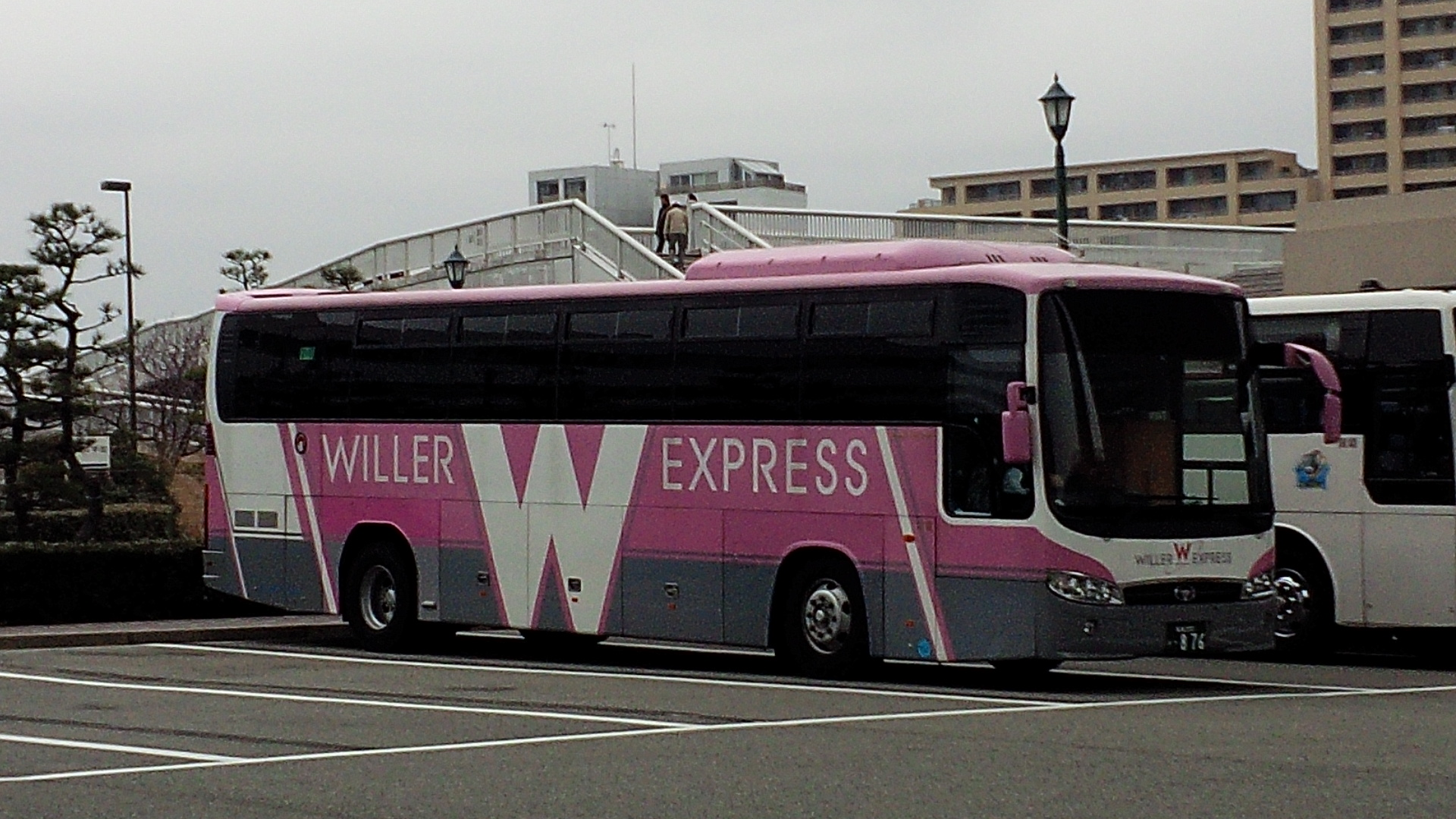 旧塗装のウィラーエクスプレス車両（さやま交通所有・貸切バス）